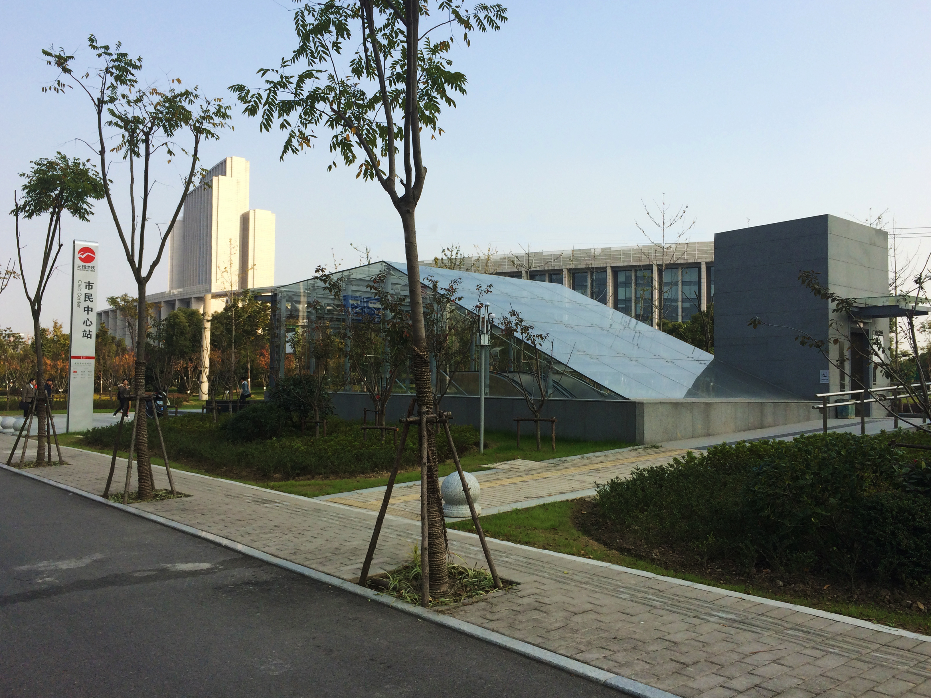 無錫地鐵市民中心站3號出入口